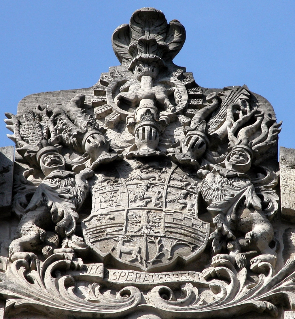 Braunschweig: Wappen Herzog Rudolf Augusts von Braunschweig-Wolfenbüttel am Giebel des Autorshofes. Braunschweig, Germany: Coat of arms of Duke Rudolf August of Braunschweig-Wolfenbüttel on the gable of Autorshof.